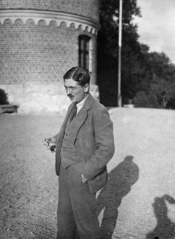 Depicted person: Ernst Klein, AMANUENS depicted place: Södermanland, Södermanland, Flen, Flen, Rockelsta (Sverige (SE))